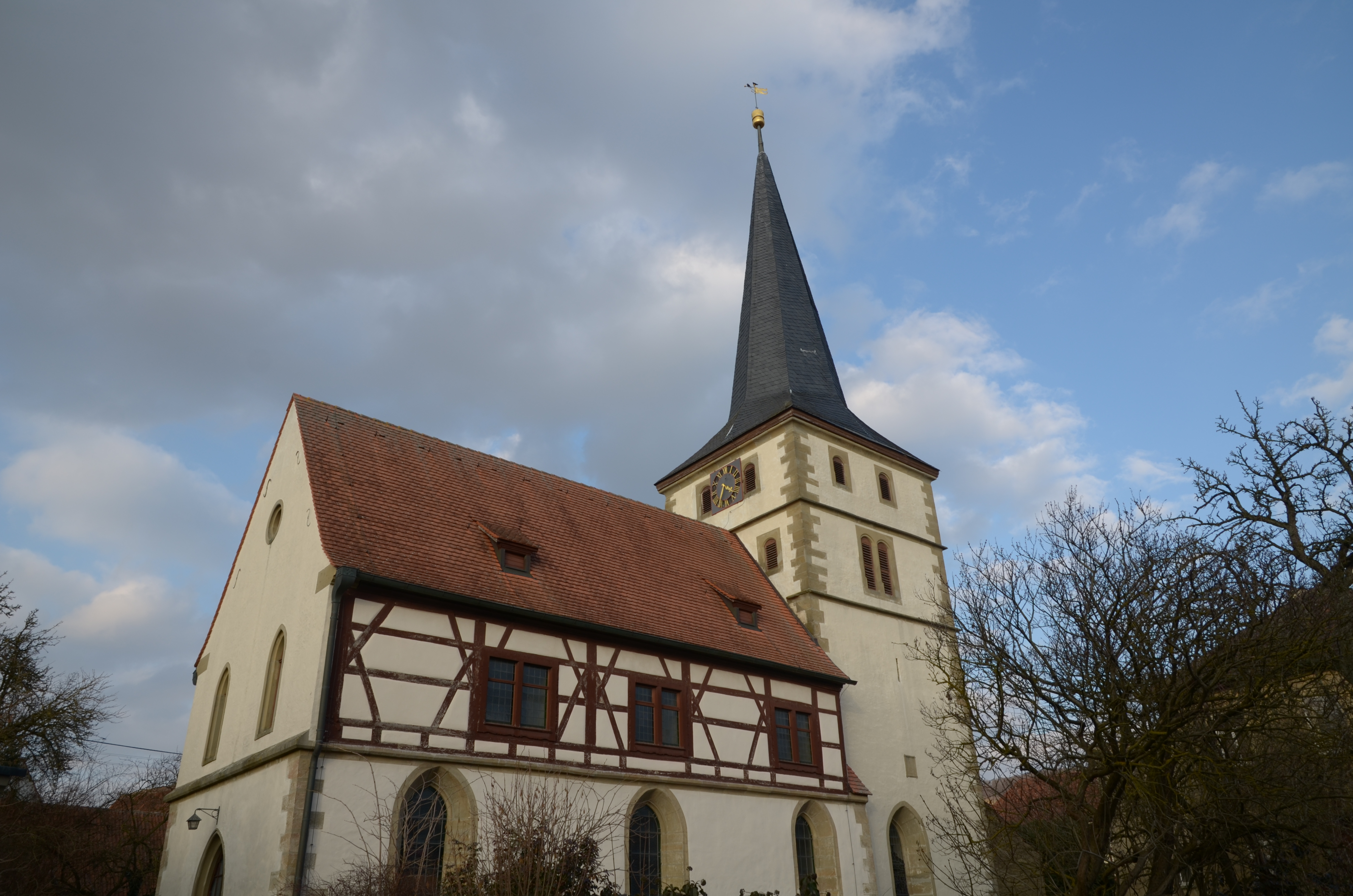 evang.-luth. Martinskirche in Wetzhausen Bonifatiuskirche in Unfinden bei Königsberg